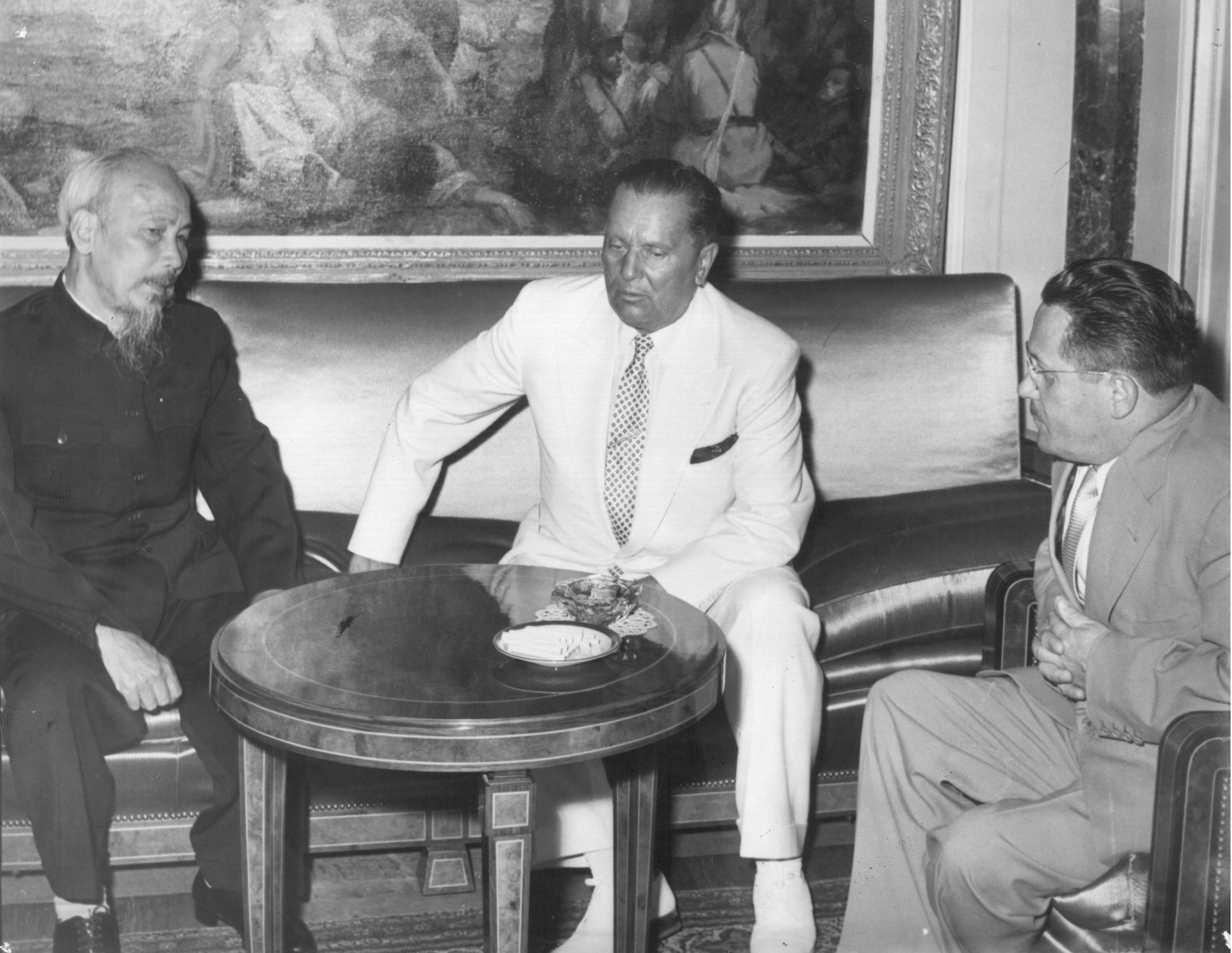 Ho Ši Min, predsednik Vijetnama i Josip Broz Titi u Beogradu, 1957.foto: Stevan Kragujević (po odobrenju kćerke Tanje Kragujević).